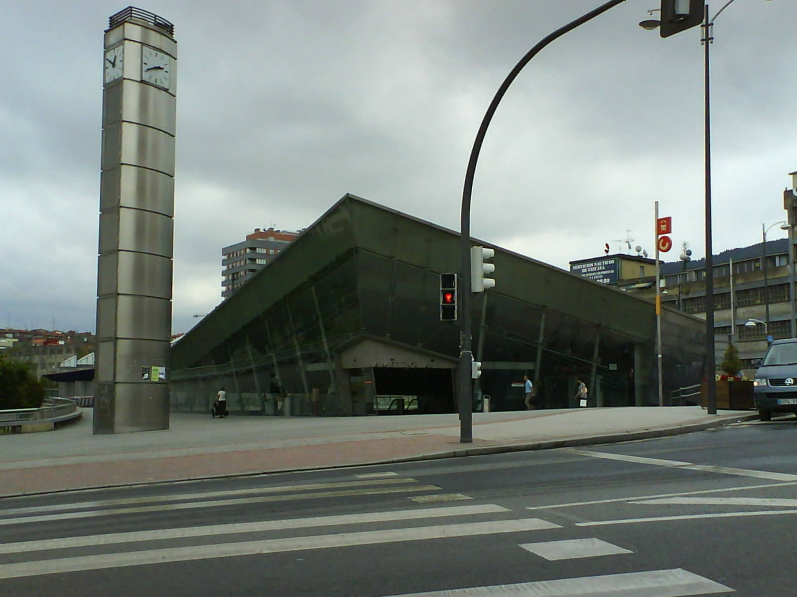 Ametzolako geltokia / Estación de Ametzola